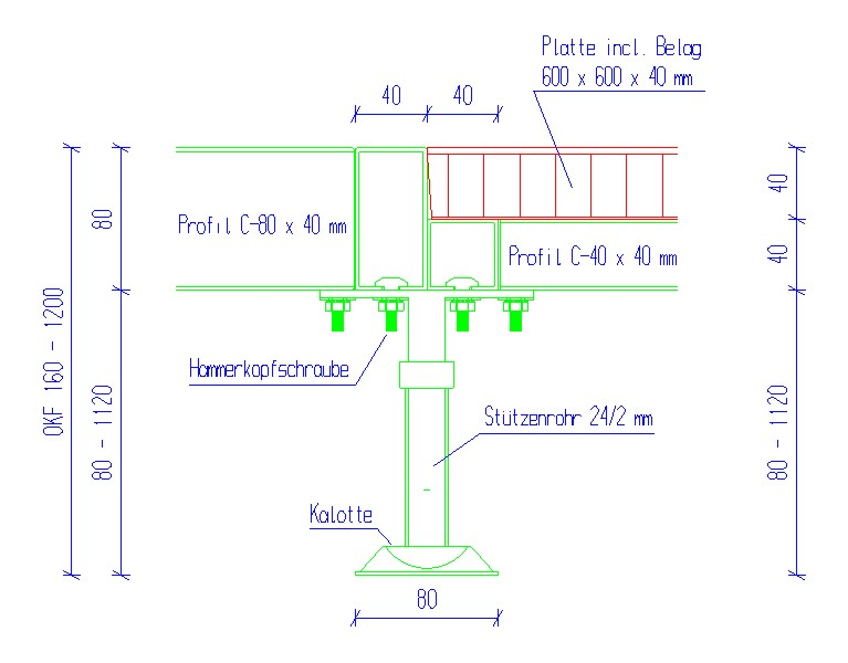 Schnitt durch einen Schaltwartenboden